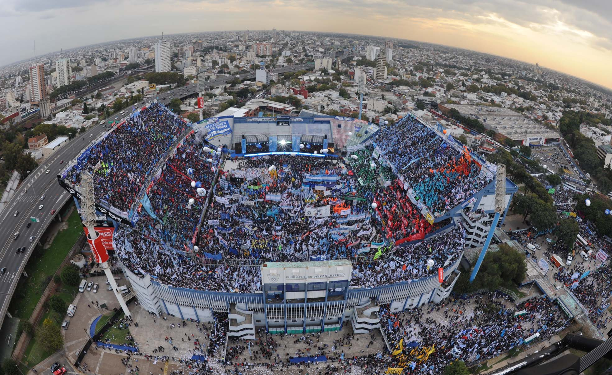 Acto Pressidencial con Movimientos Sociales en Estadio "José Amalfitani" (Club Atlético Vélez Sarsfield)